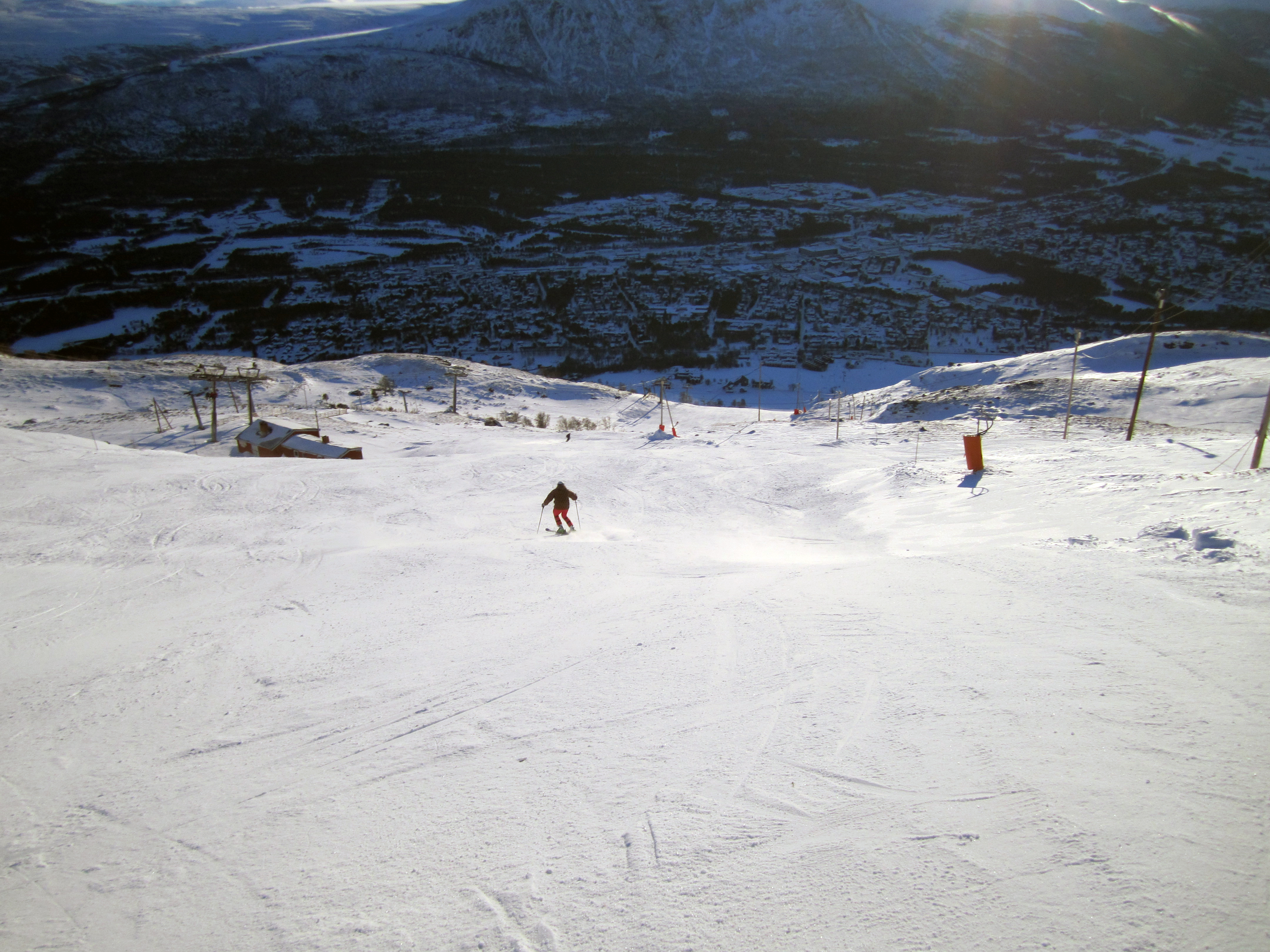 Hovden i Oppdal skisenter